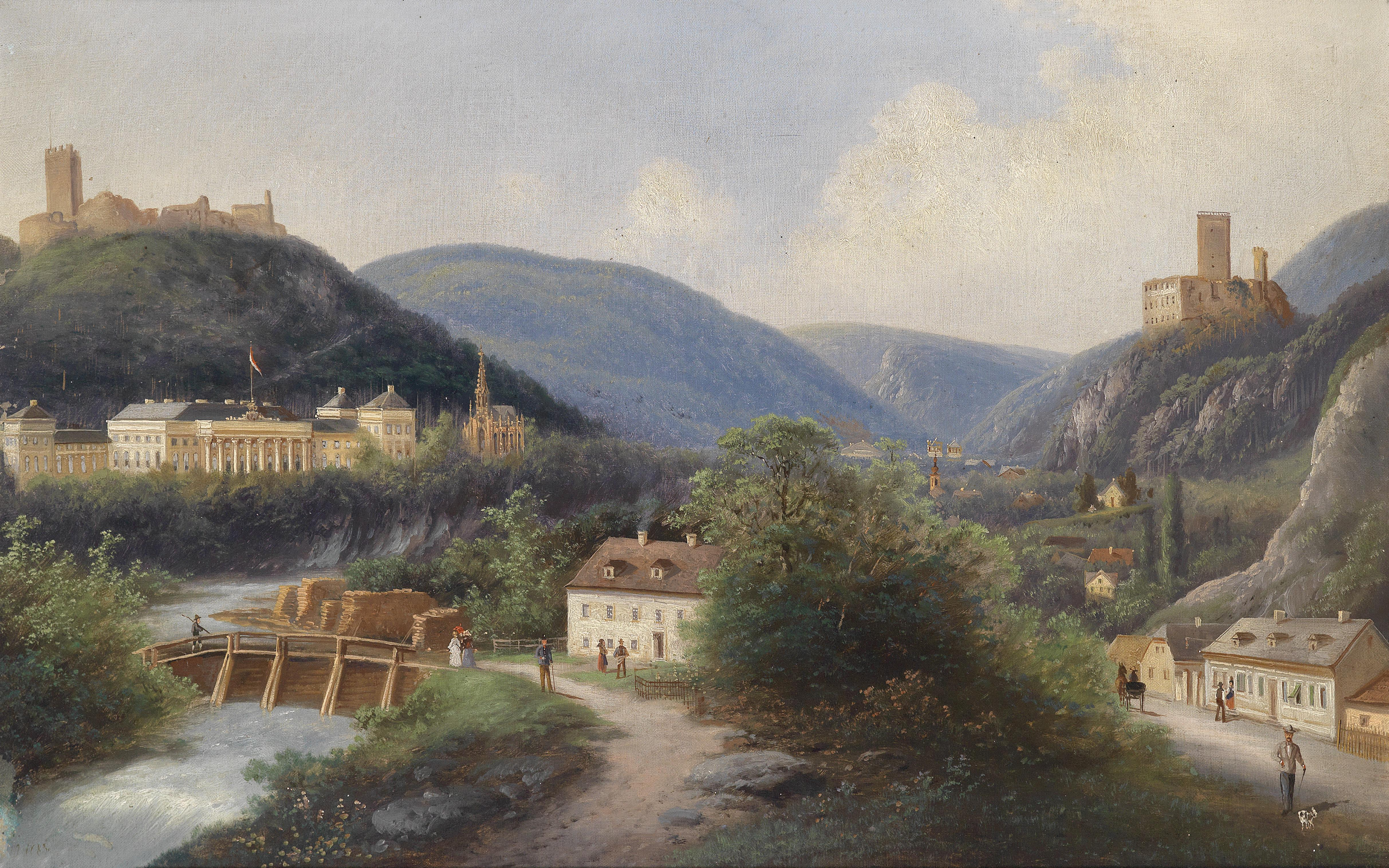 Blick auf die Weilburg (bei Baden)